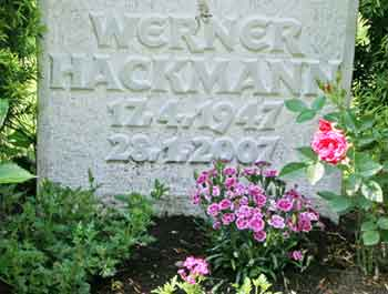 Die Grabstätte von Werner Hackmann auf dem Friedhof Bergedorf in Hamburg.